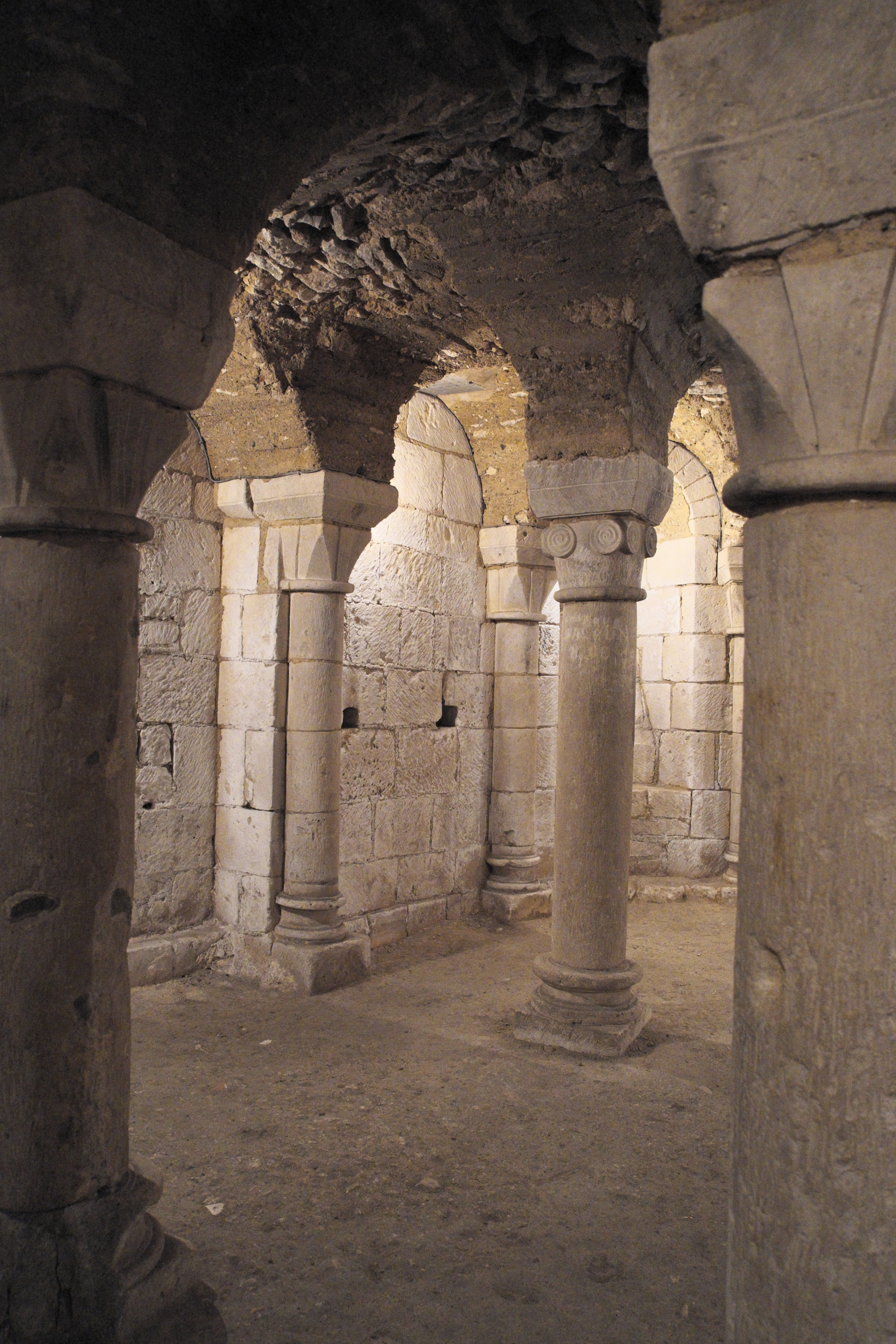 Katholische Pfarrkirche Notre-Dame-de-l’Assomption in Fontenay-le-Comte im Département Vendée (Pays de la Loire/Frankreich), Krypta aus dem 9./10. Jahrhundert